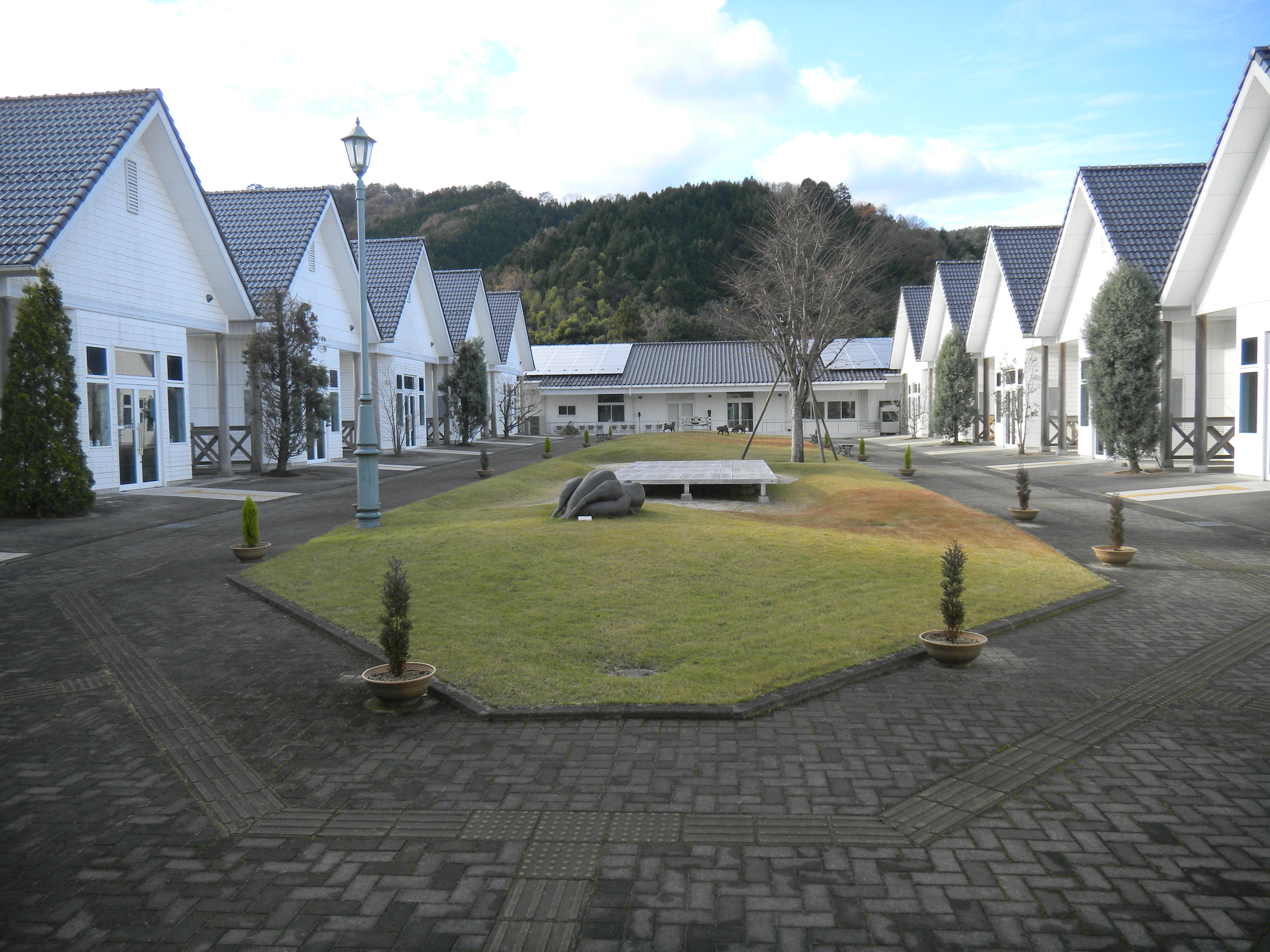 八千代の丘美術館・展示棟